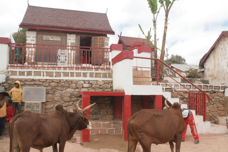 alamady 3